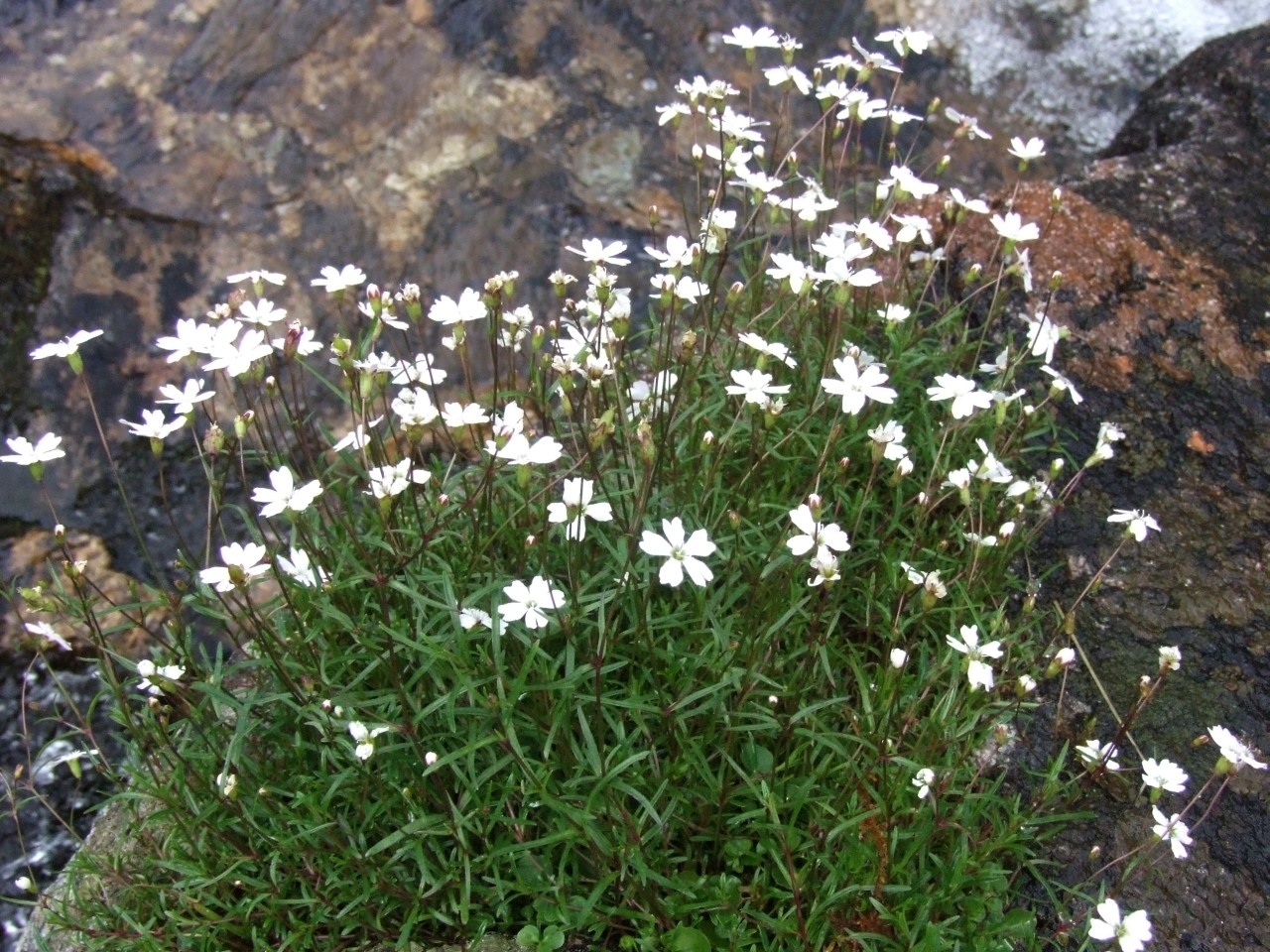 Heliosperma quadrpipetatum